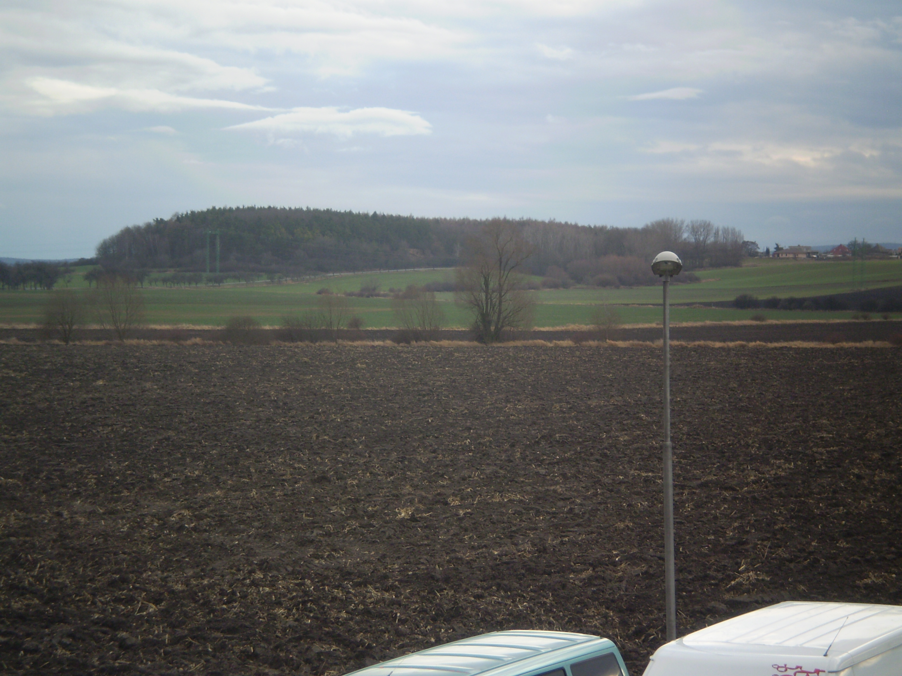 Vrch Křemen